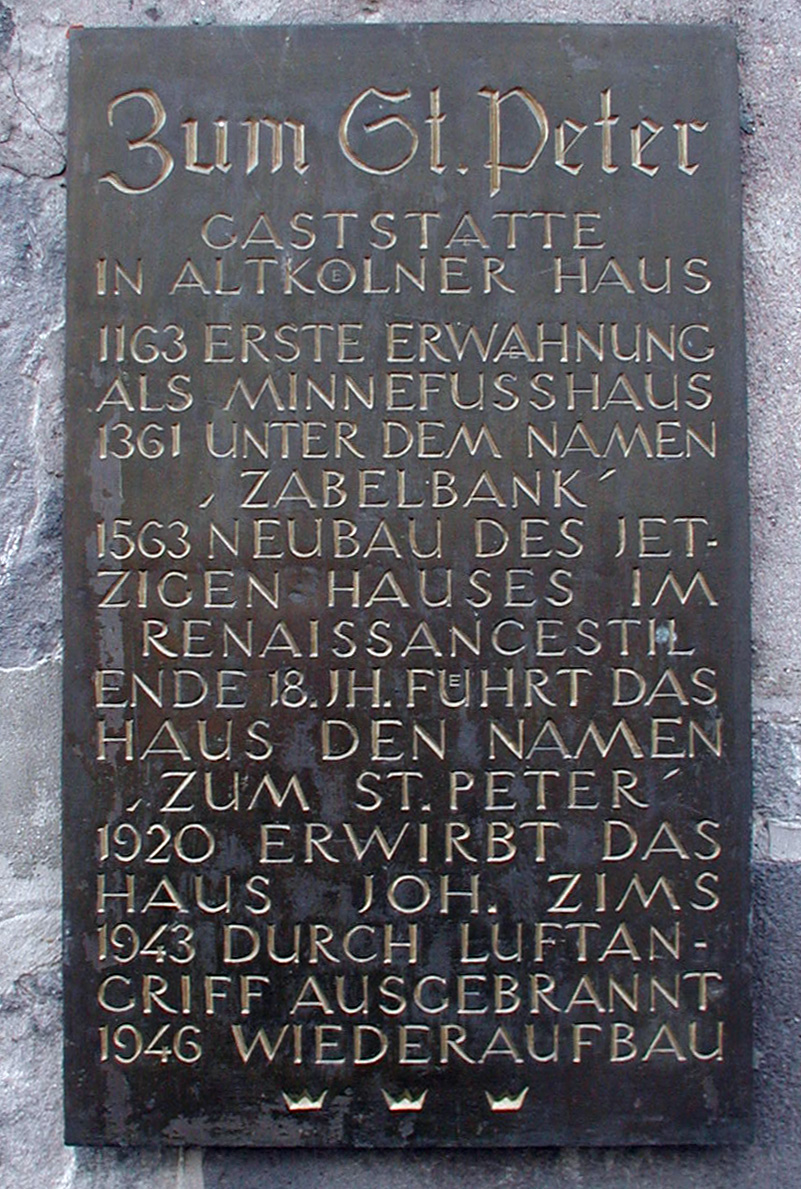 Köln,Info Haus St.Peter Heumarkt